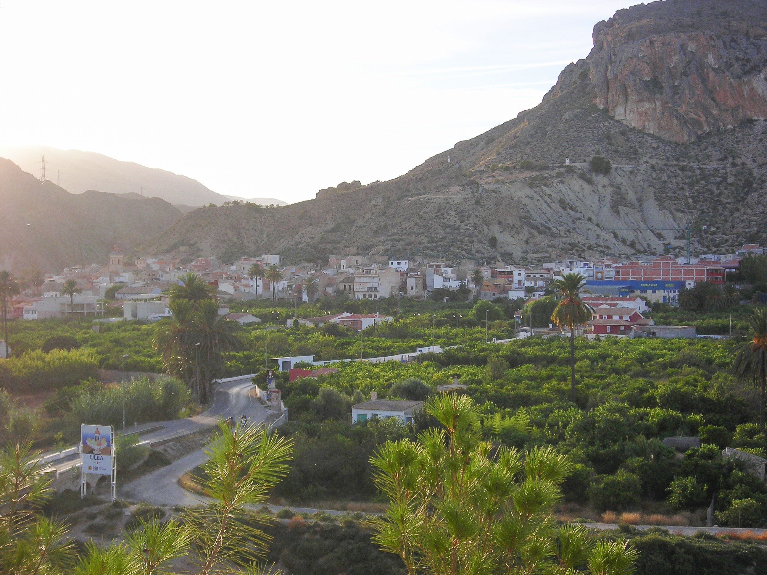 Vista de la localidad de Ulea (Murcia) desde Villanueva del Río Segura.